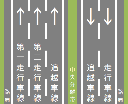 日本の道路における「走行車線」「追越車線」「路肩」の模式図